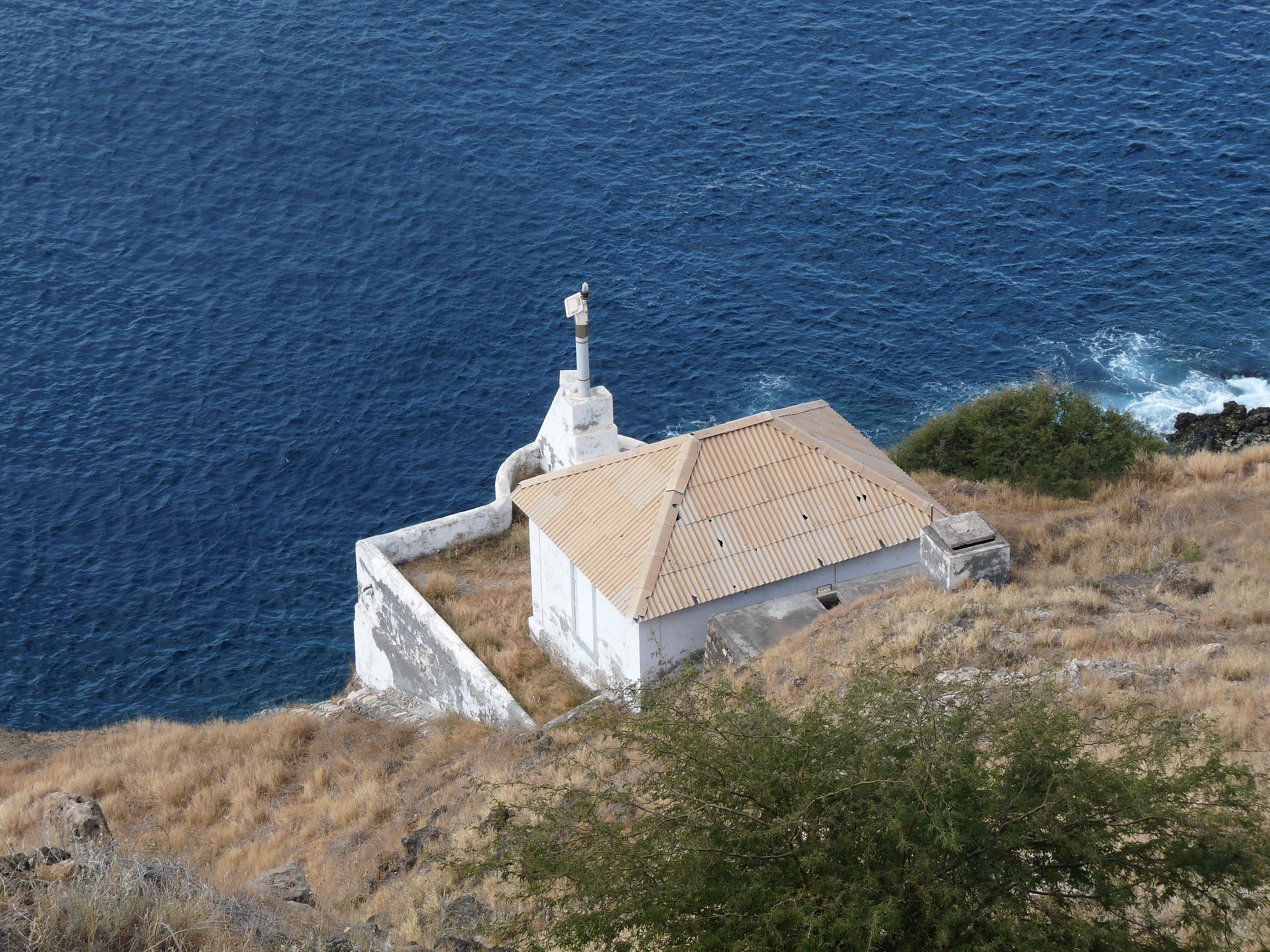 Phare (désaffecté) de Ponta Preta (île de Santiago, Cap-Vert)